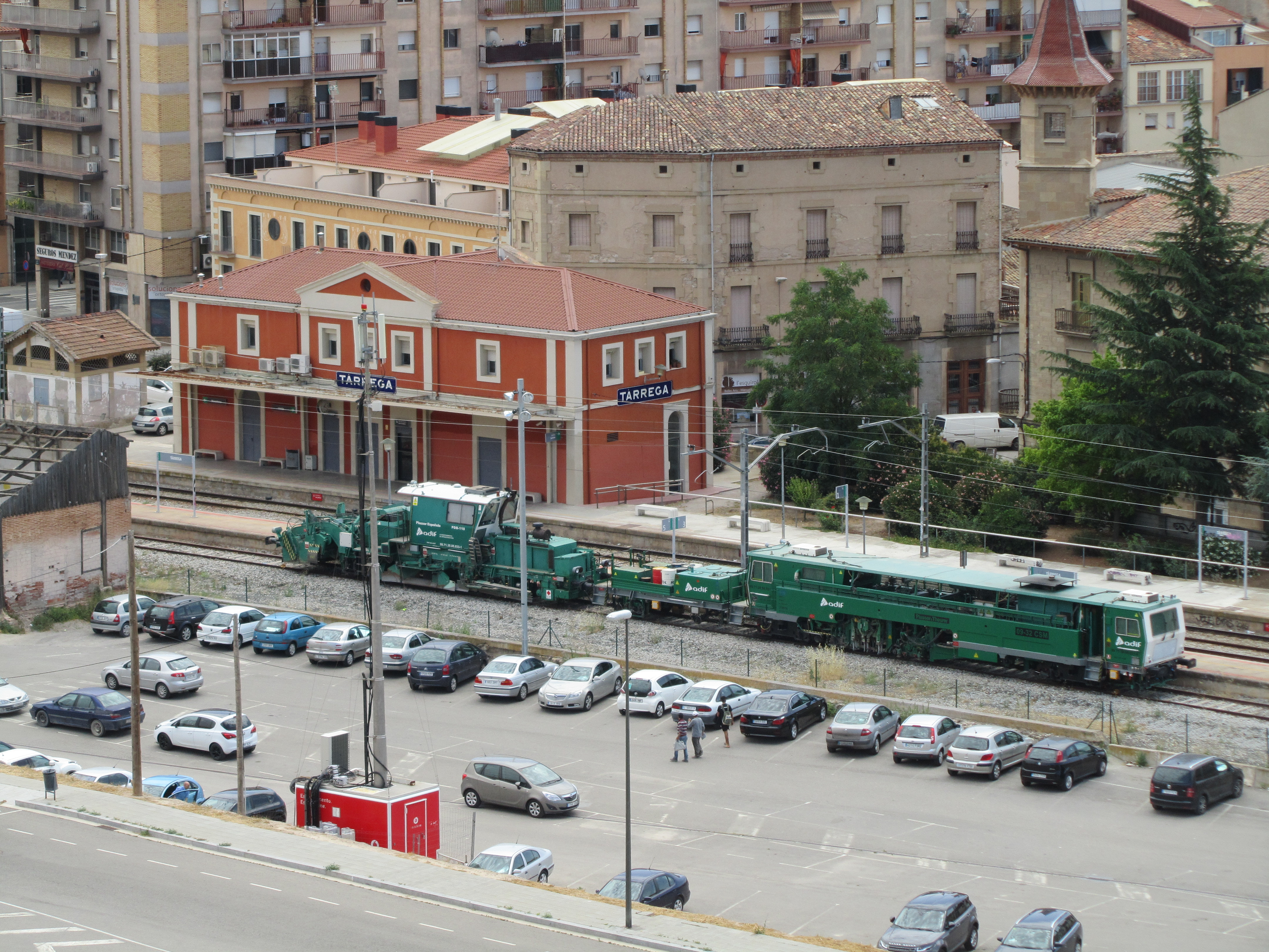 Tàrrega: Estació de tren